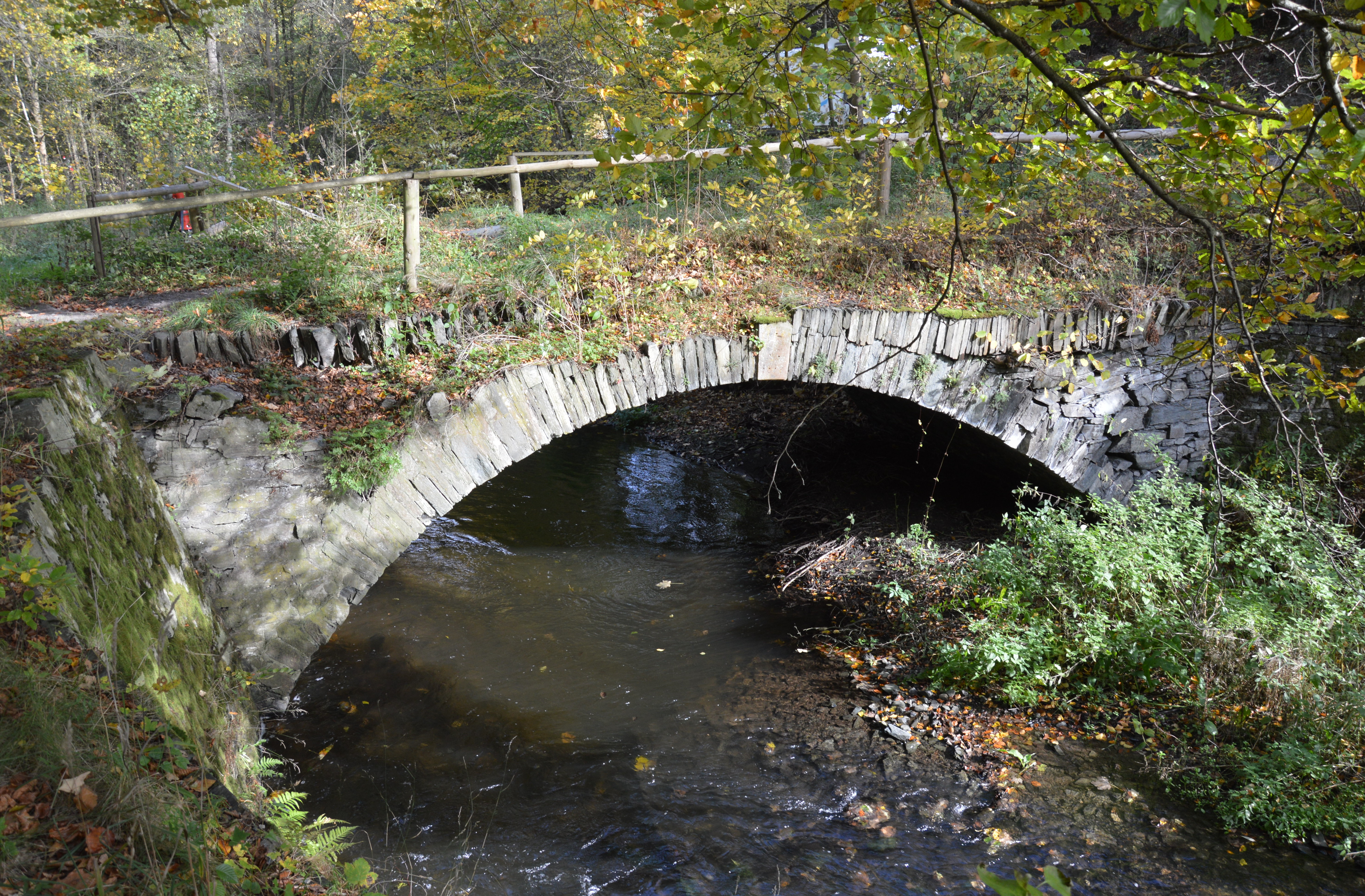 Brücke am Drahtzug